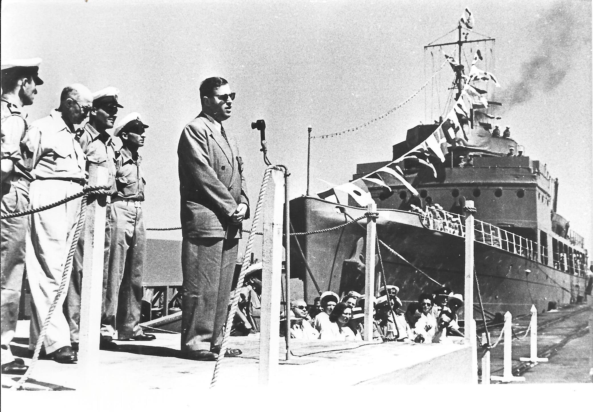 אבא אבן ודוד הכהן בטקס ליד חרטום אח"י אילת (א-16)